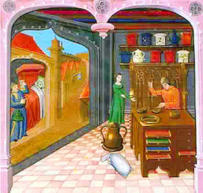 Épicier et malade buvant du garhiofilatum